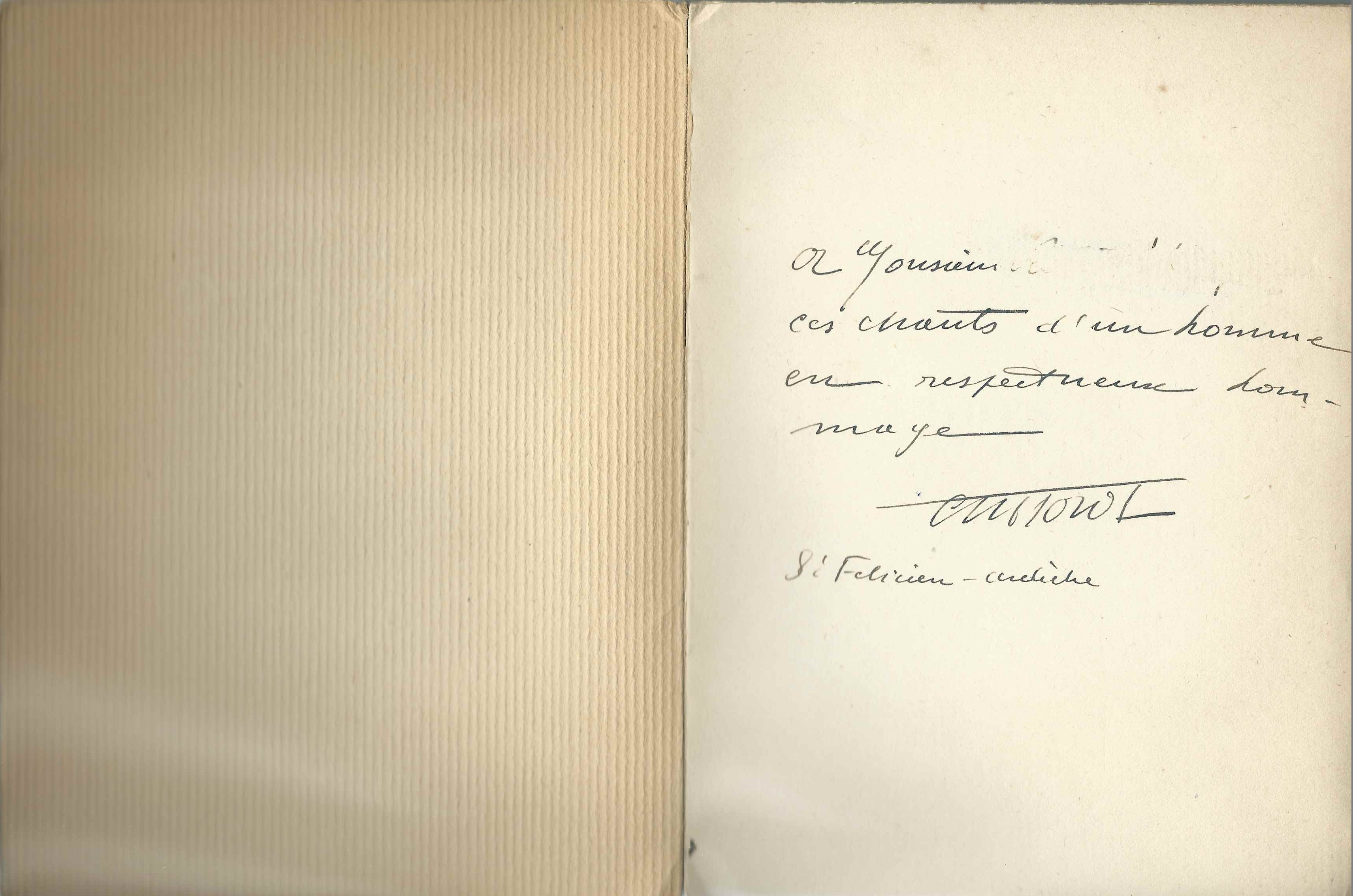 Dédicace autographe de Charles Forot